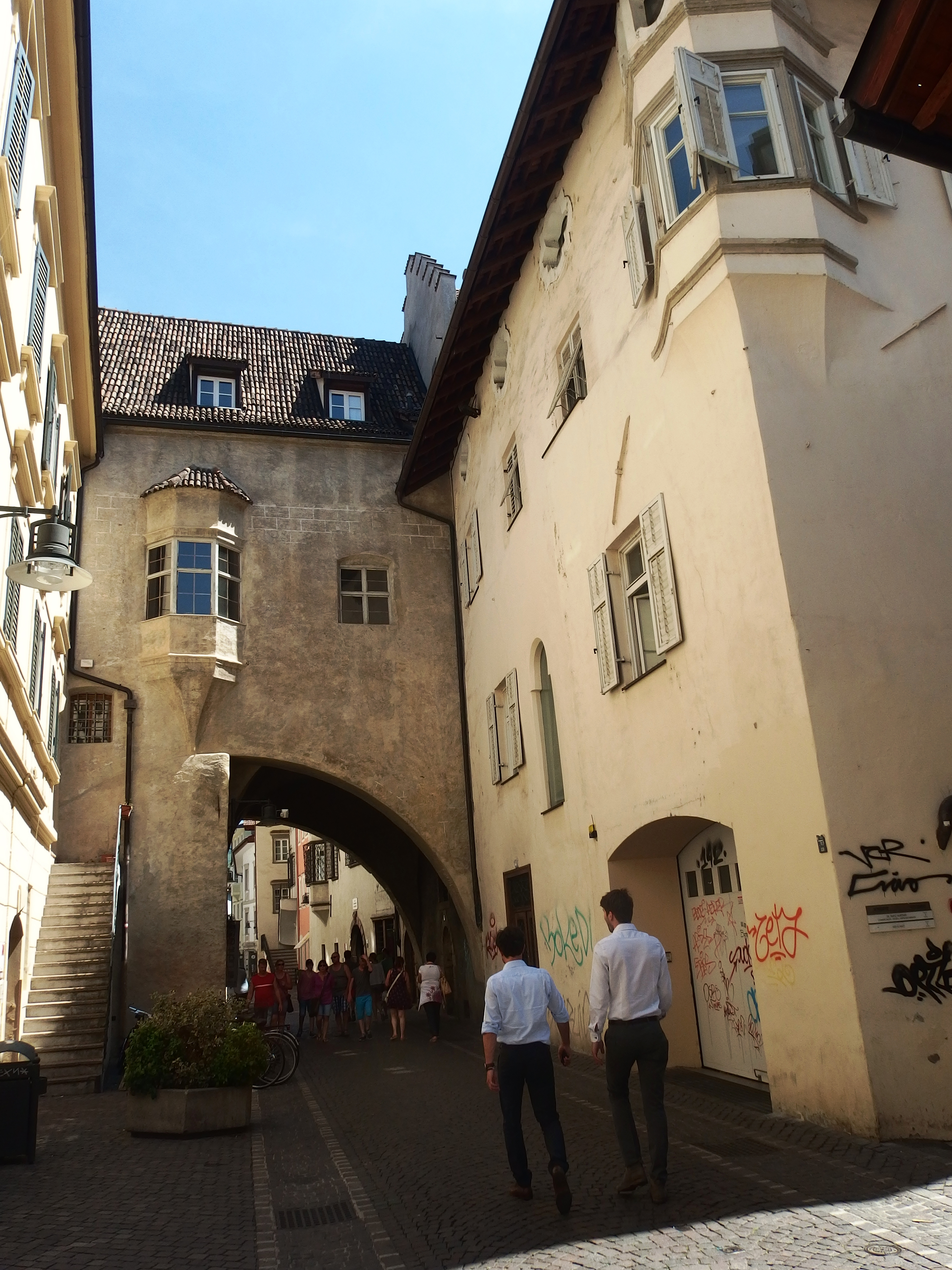 Bozen, Südtirol: Dr.-Josef-Streiter-Gasse 27-27a, Ansitz Thurn.